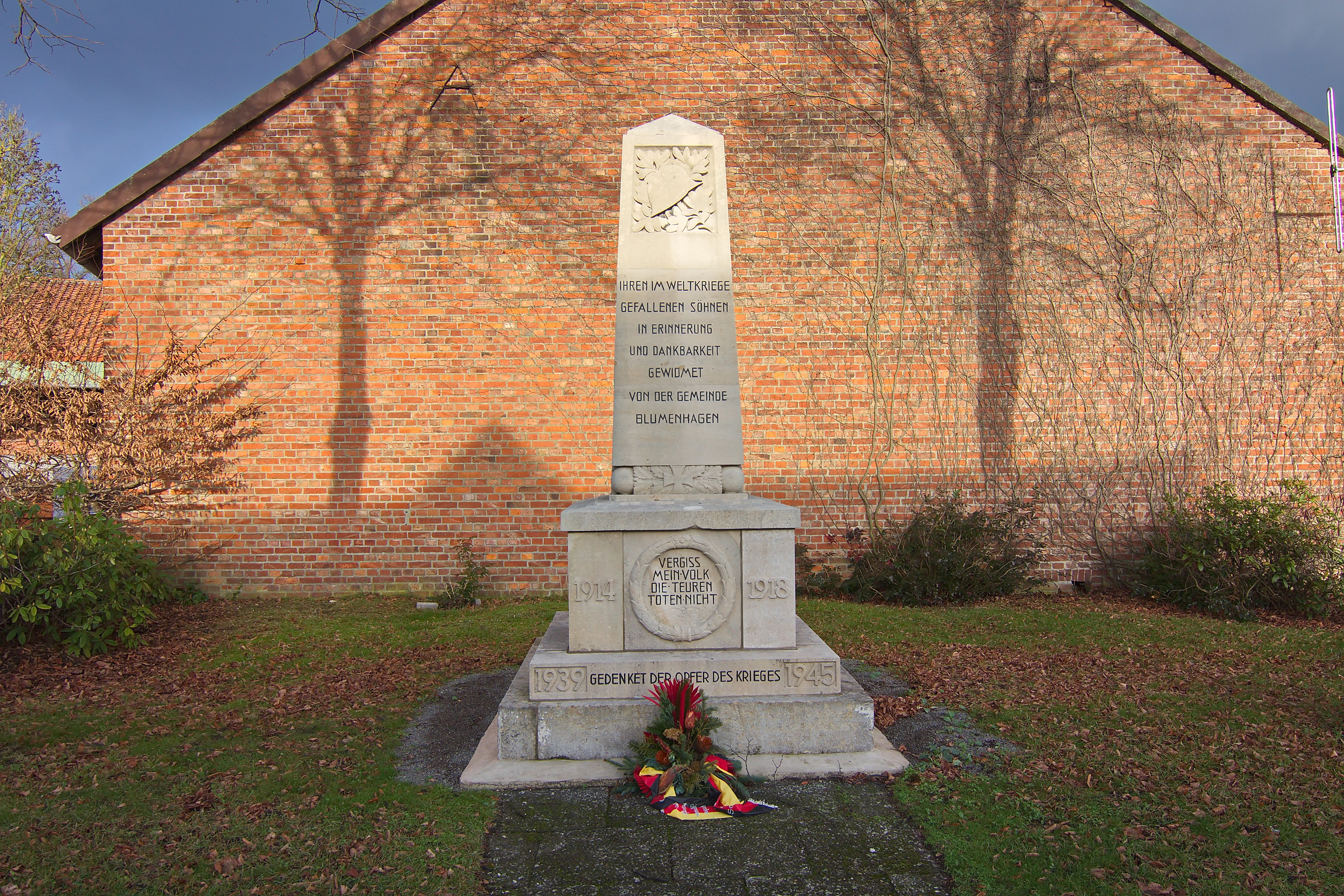 Kriegerdenkmal Blumenhagen (Edemissen), Niedersachsen, Deutschland